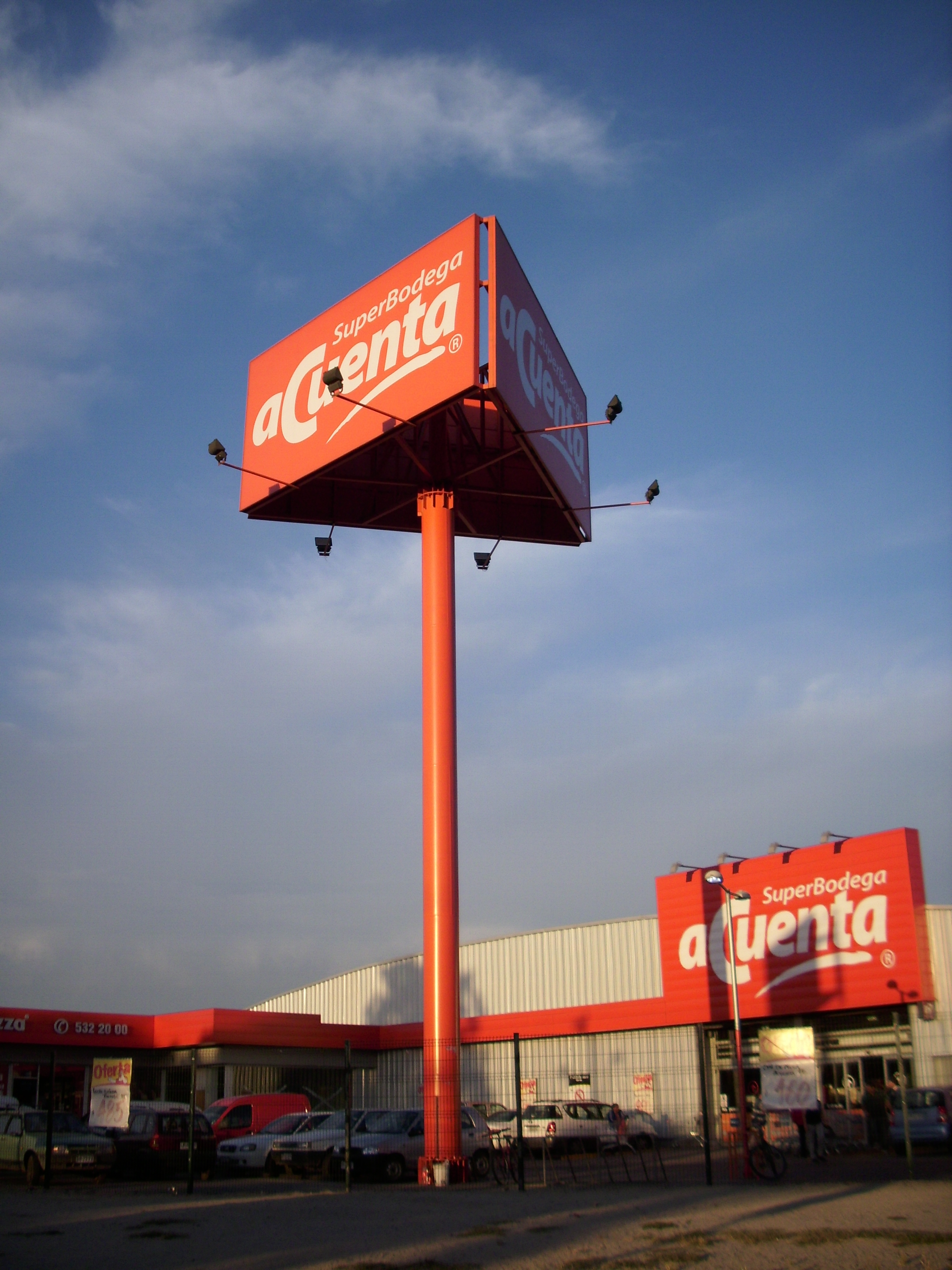 La fachada del supermercado Acuenta, perteneciente a Walmart Chile, ubicado en Av. Sur 411, Maipú. Inaugurado el 29 de noviembre de 2009. Santiago de Chile, 30 de noviembre de 2010.